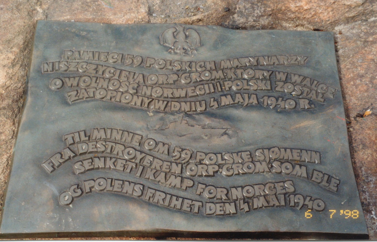 Tablica na pomniku w Narwiku. Zdjęcie własne. Skan.